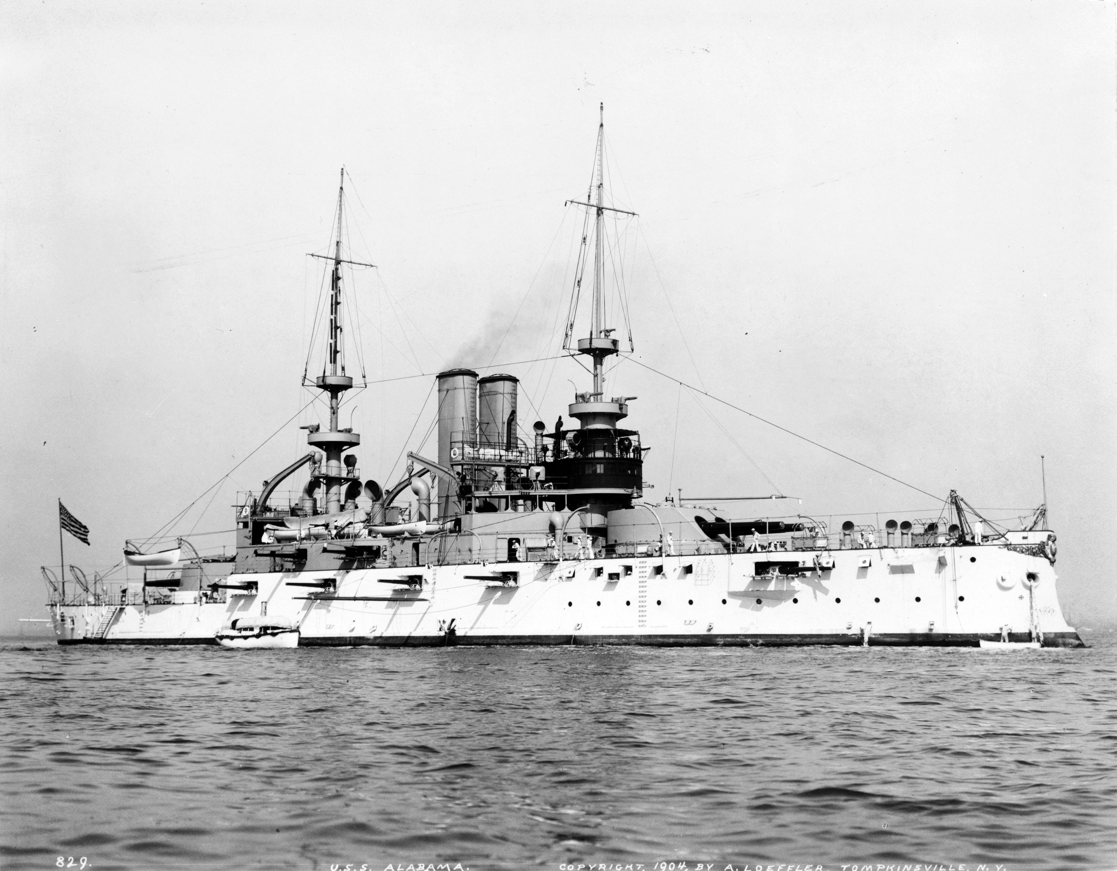 USS Alabama (BB-8)